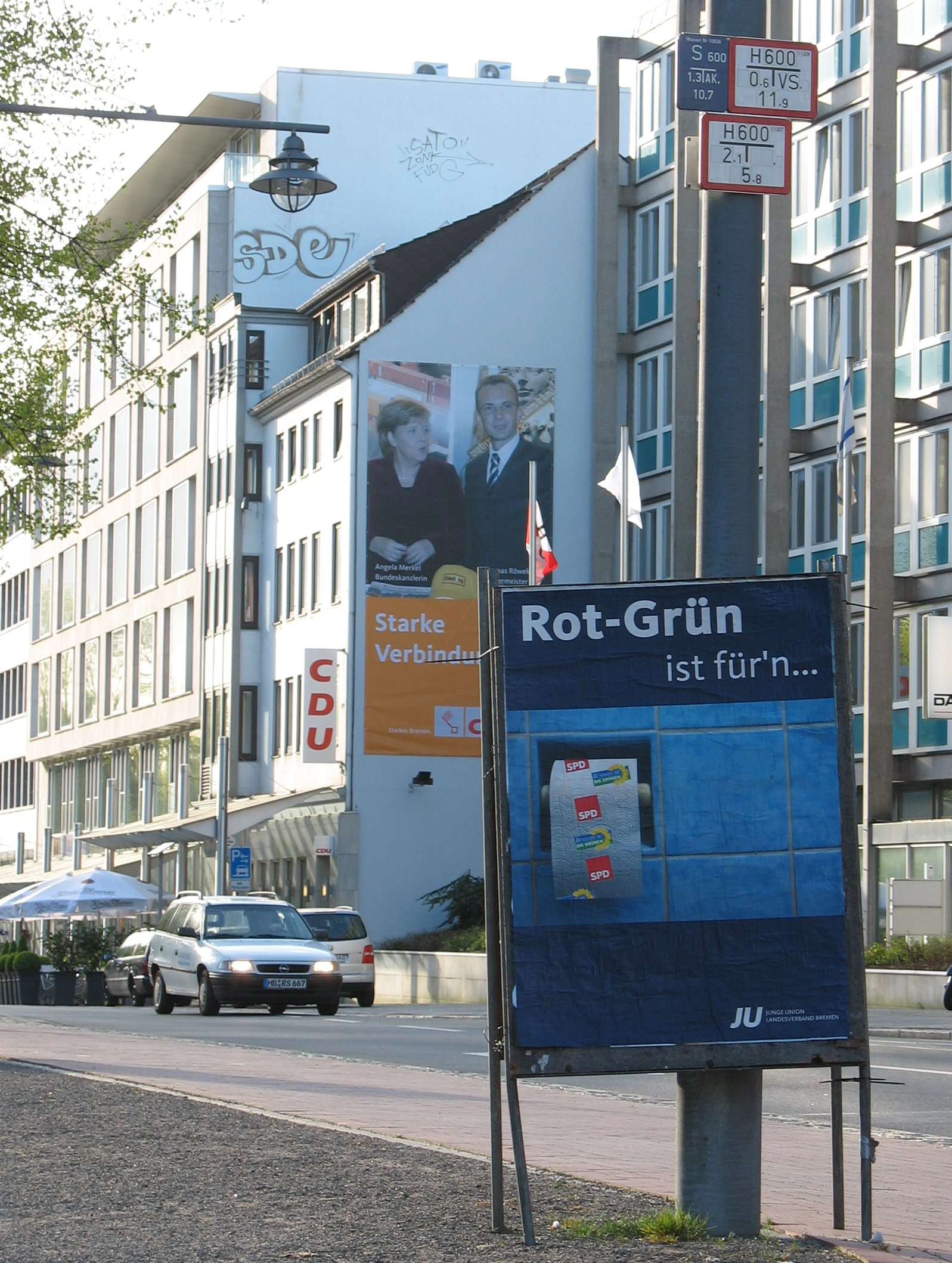 Geschäftstelle des CDU-Landesverbandes Bremen.